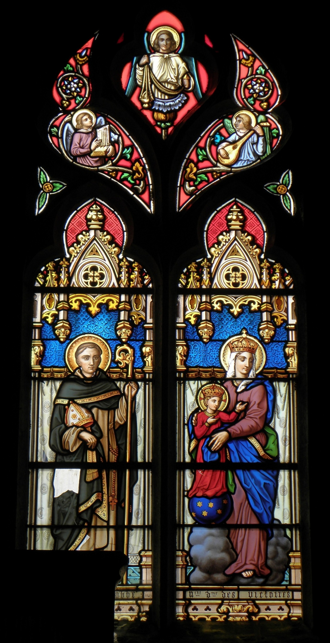 Baie 02 de l'égise Saint-Gildas de Magoar. Saint-Gildas et Notre-Dame-des-Victoires.